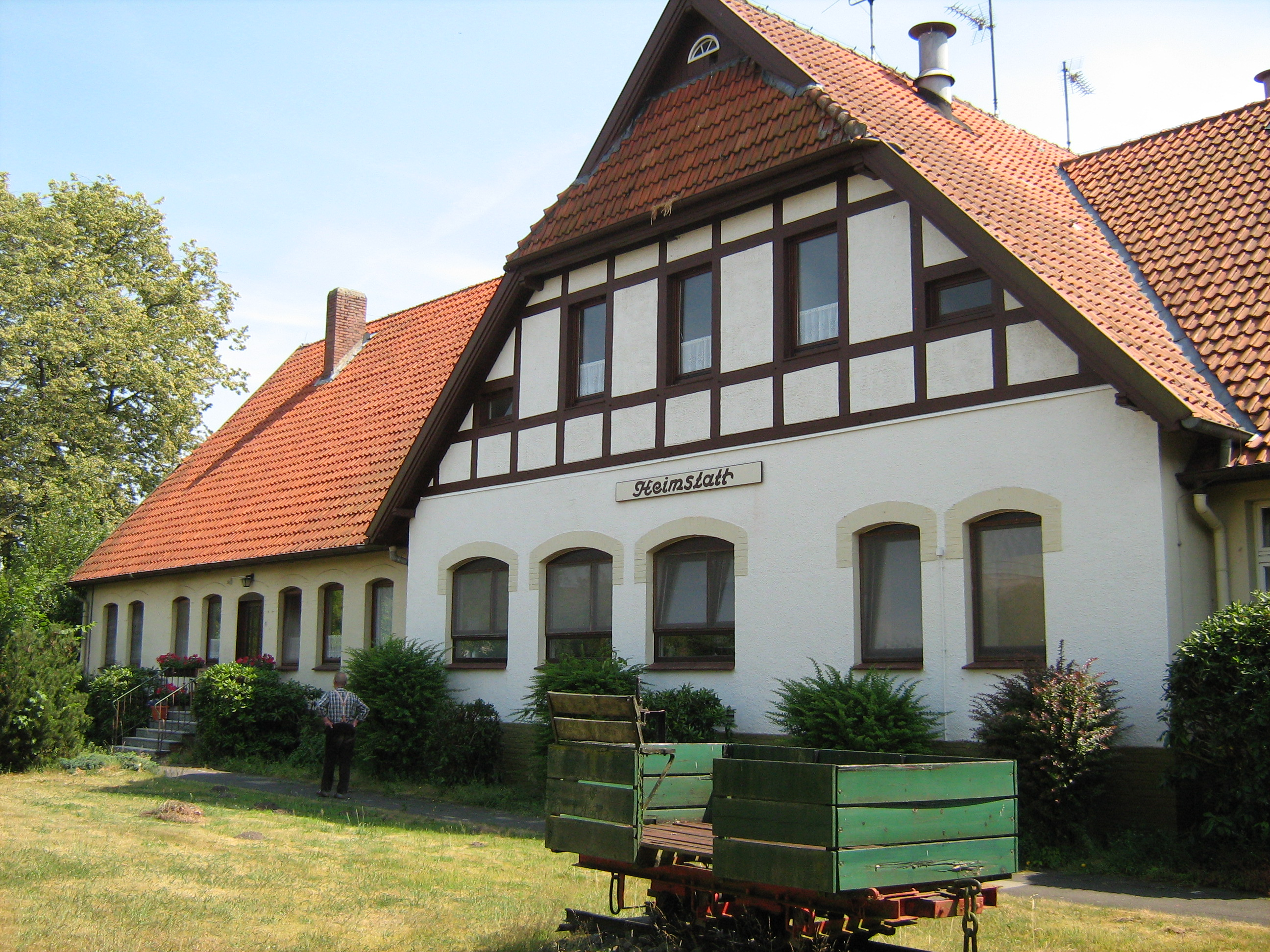 Freistatt-Heimstatt 2010